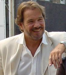 Der Schauspieler Götz George. Bildausschnitt aus Image:Schimi-hun1.jpg. Fotografiert im Sommer 2001 Fotograf: Harald Schrapers Lizenzstatus: GNU FDL